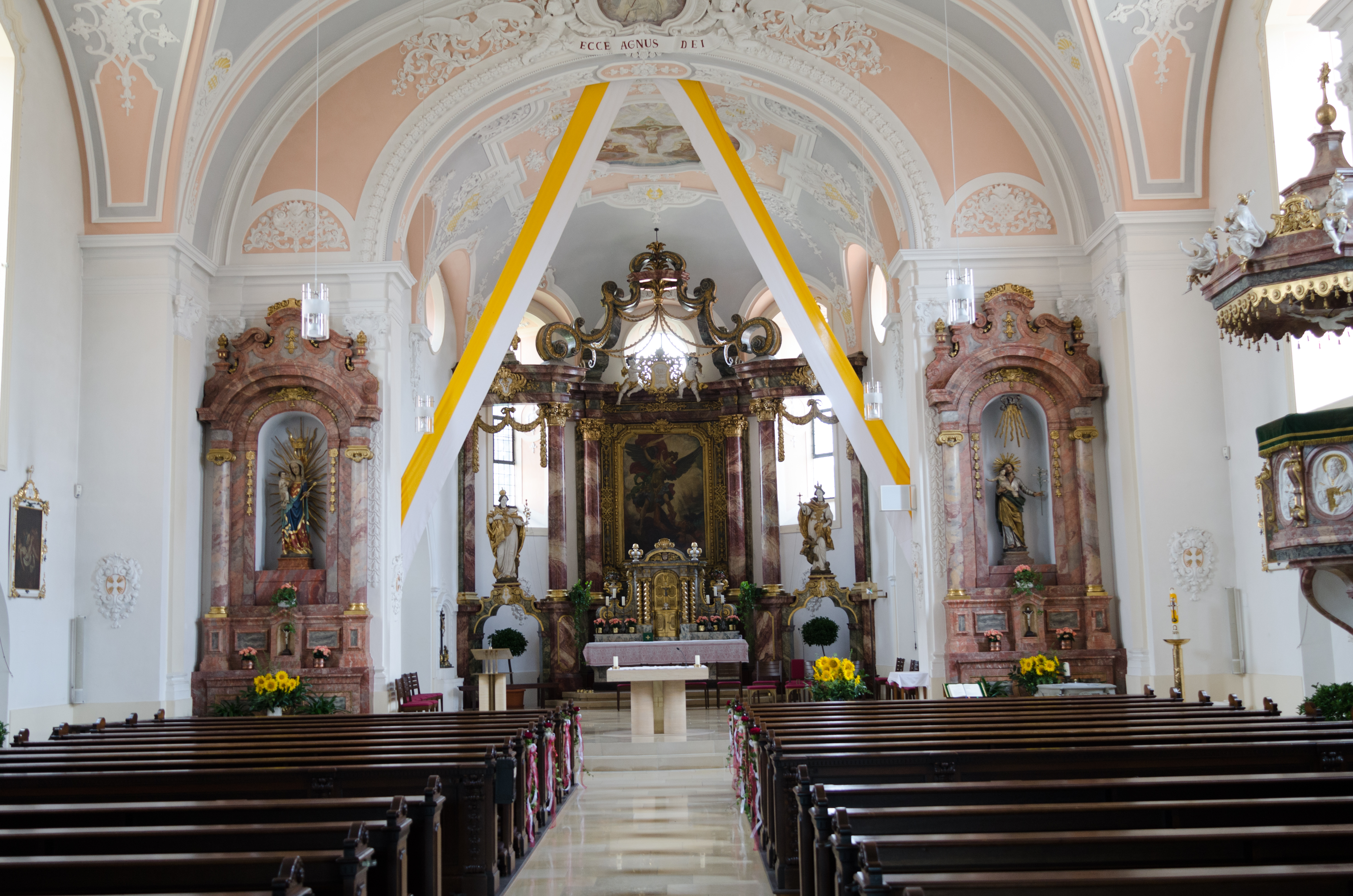 Stadtsteinach, kath. Pfarrkirche St. Michael